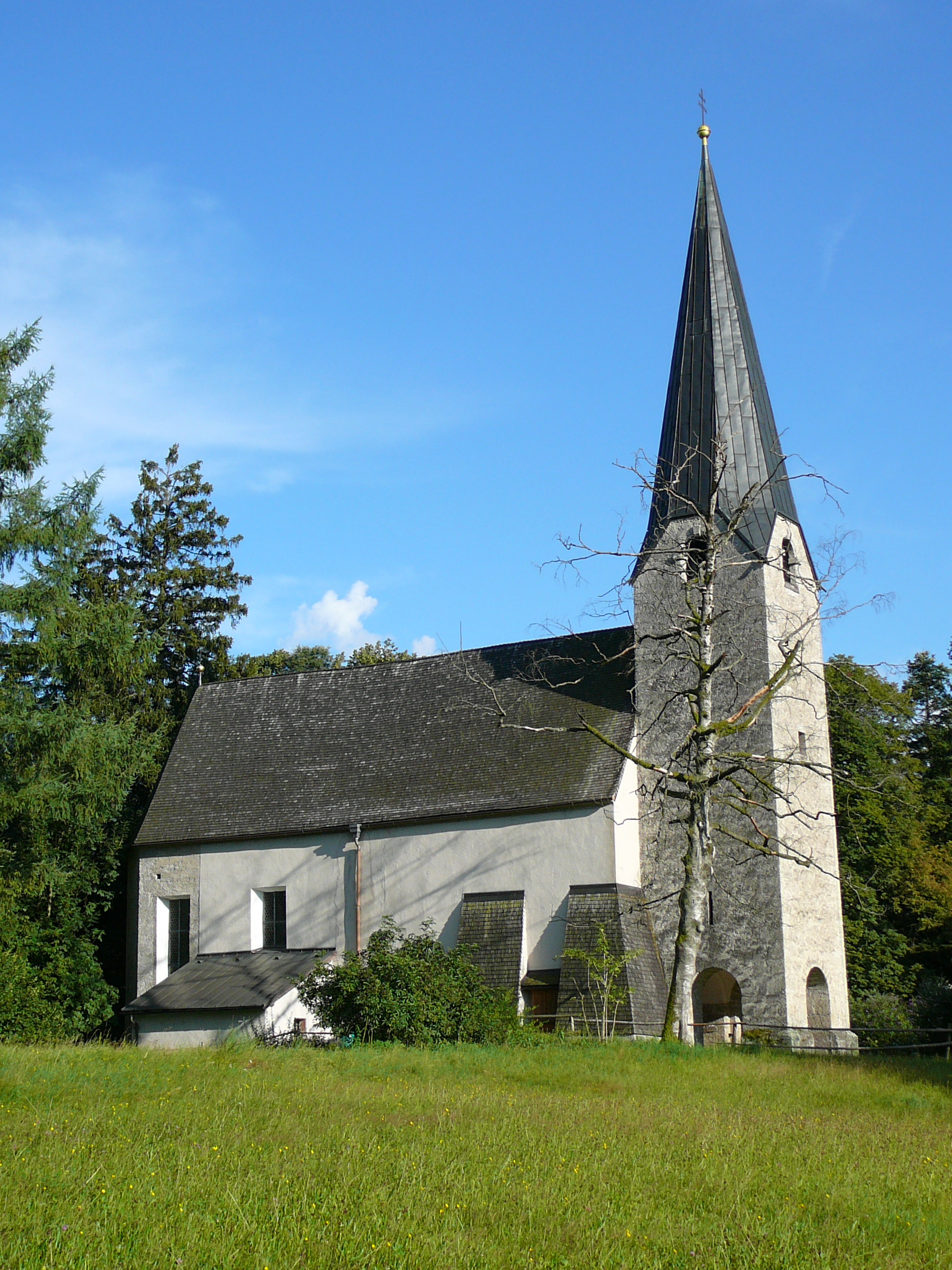 Kath. Filialkirche hl. Georg